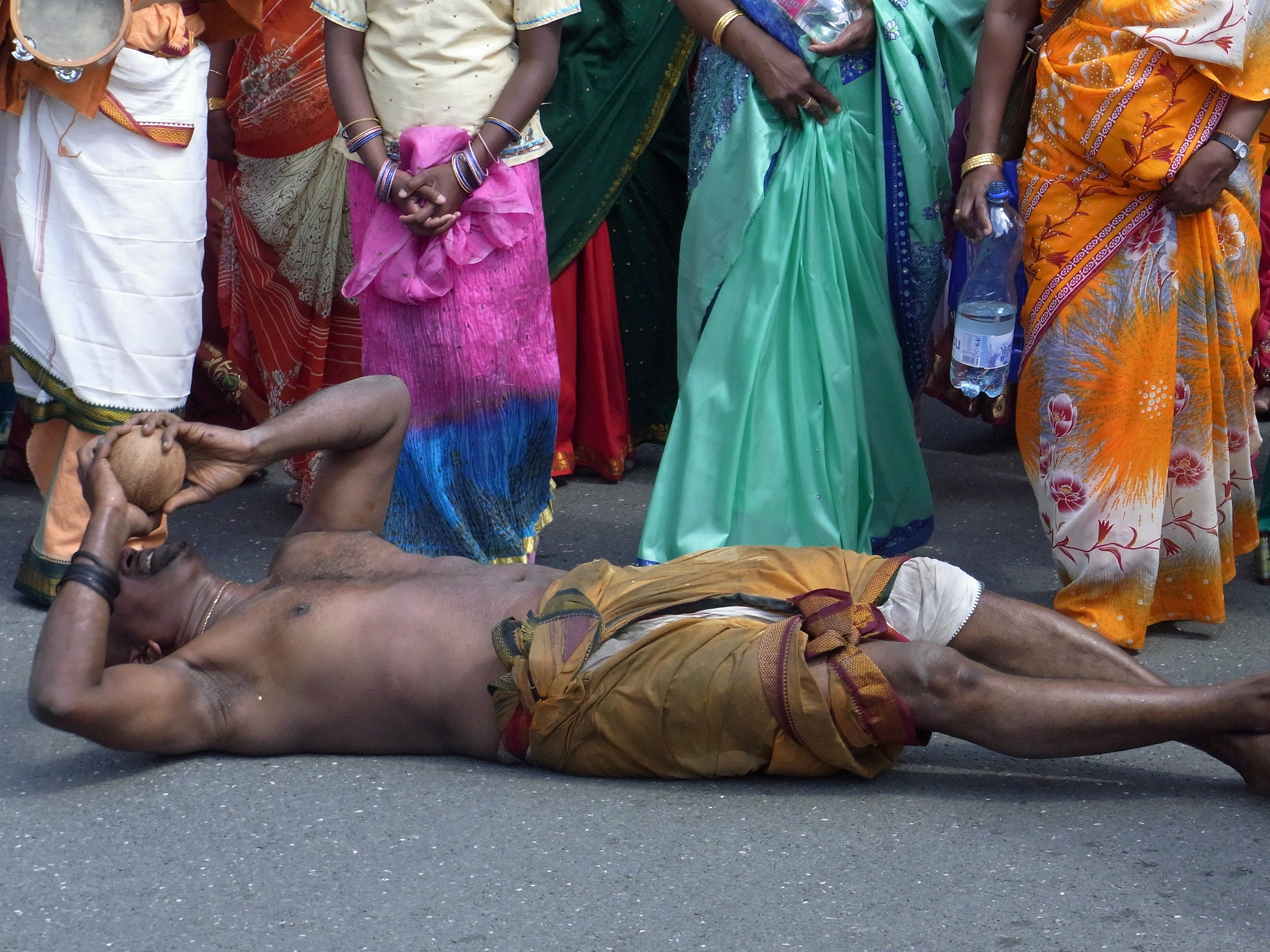 Sri-Kamadchi-Ampal-Tempel: Tempel Festival 2011. Der Tag der Großen Prozession.